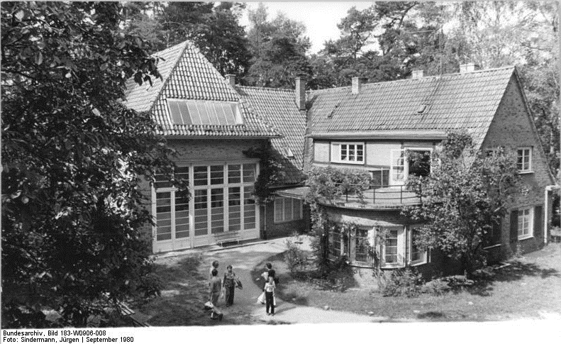 Güstrow, Ernst-Barlach-Gedenkstätte ADN-ZB Sindermann 06.09.80-Güstrow: Schöne DDR - Die Barlach-Werkstatt am Inselsee ist heute Anziehungspunkt für Interessenten aus dem In- und Ausland. Von 1912 bis 1938 war Güstrow die Wirkungsstätte des Bildhauers Ernst Barlach. In der jetzigen Gedenkstätte für den Künstler befindet sich in den Arbeitsräumen eine umfassende Ausstellung seiner Werke.